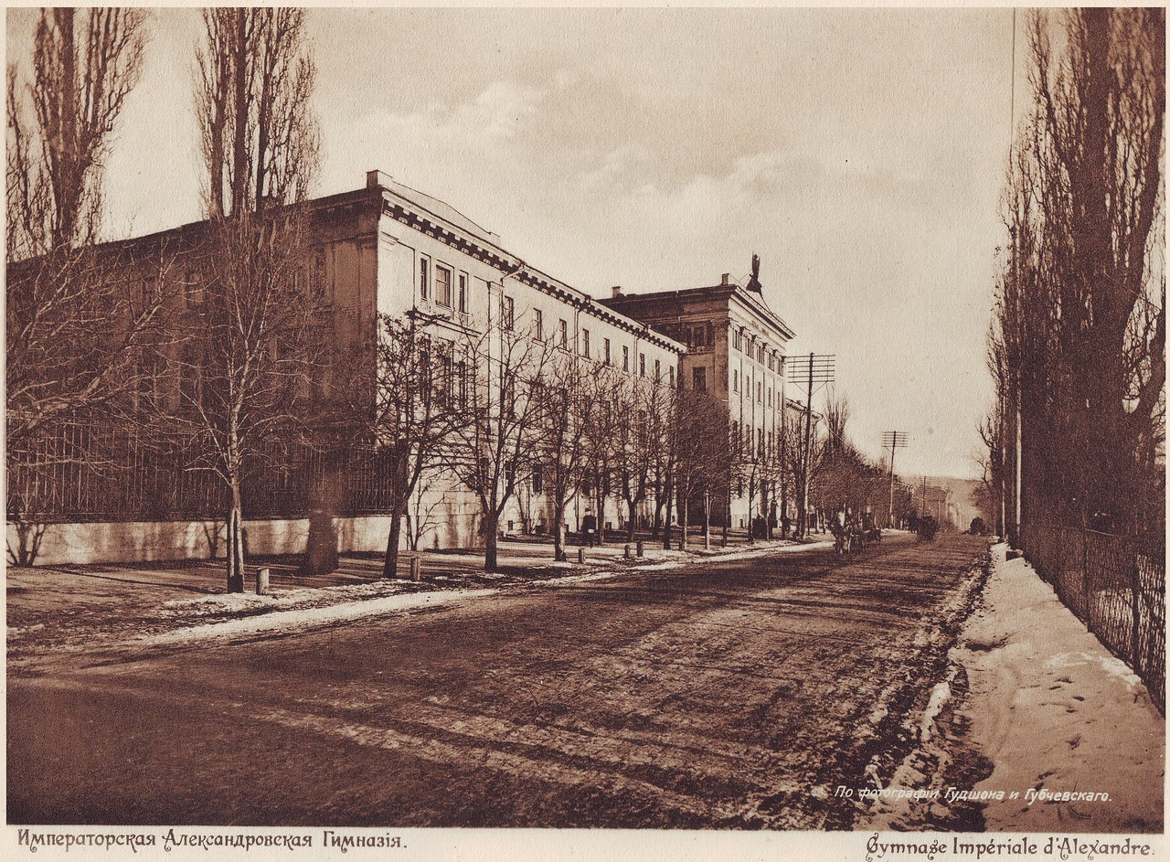 Олександрівська гімназія Київ 1911